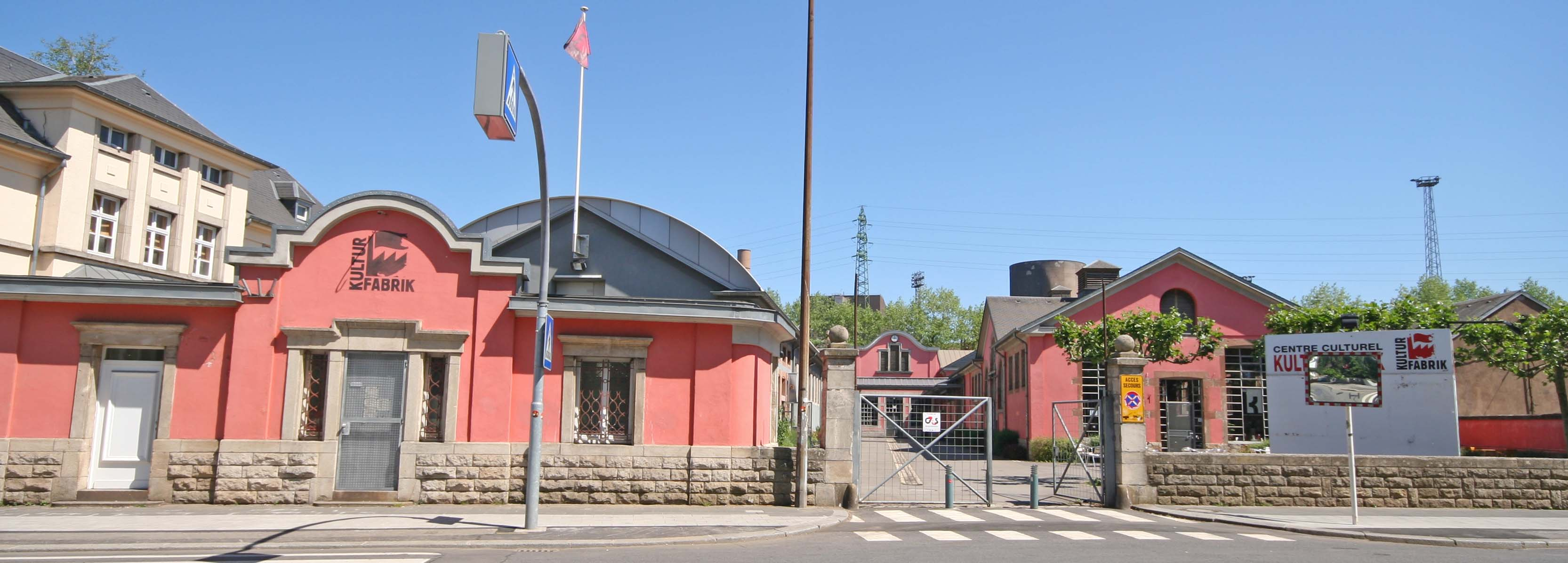 Kulturfabrik vu vir